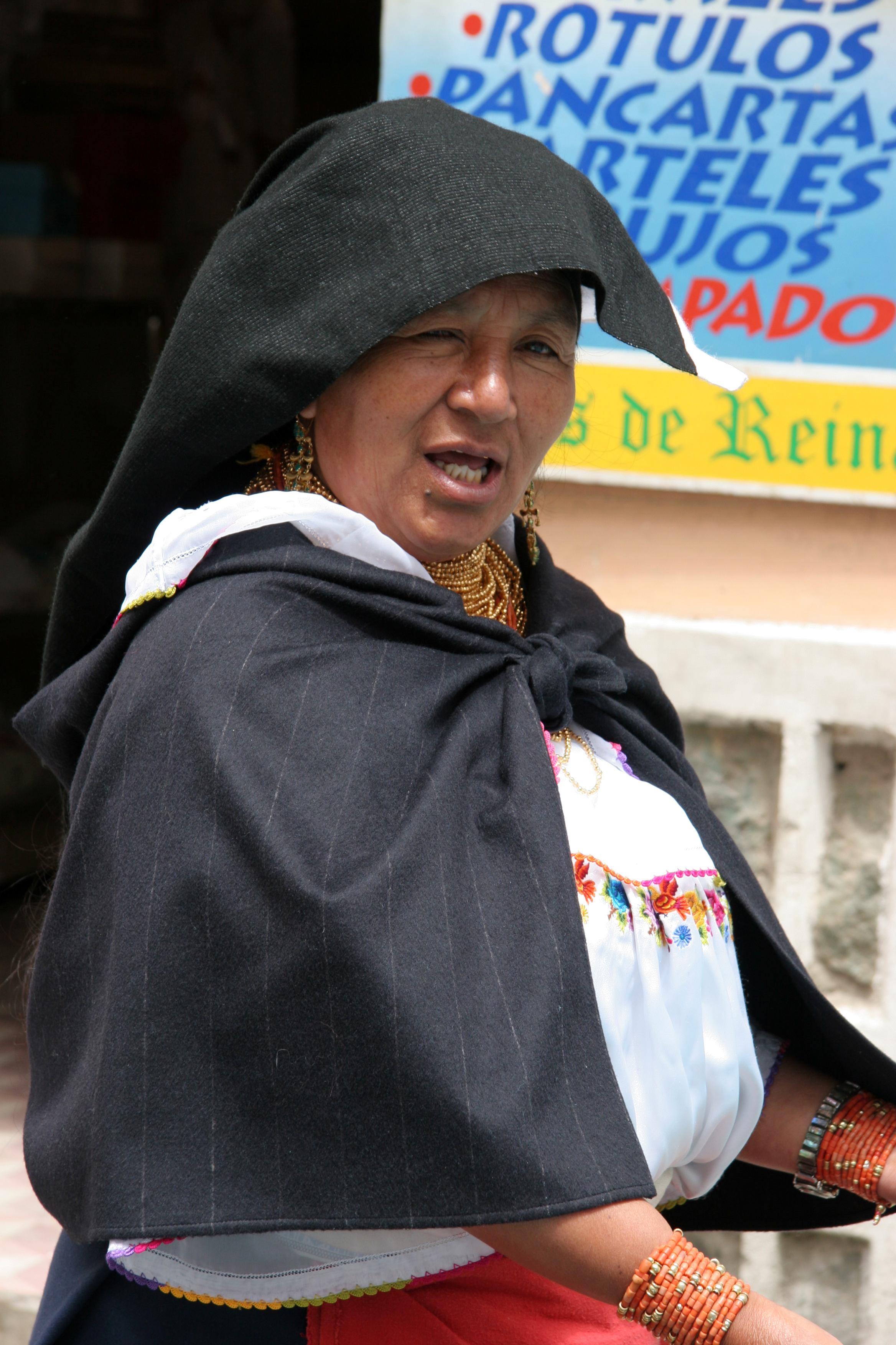 équateur, otavalo, femme quechuas otavalo